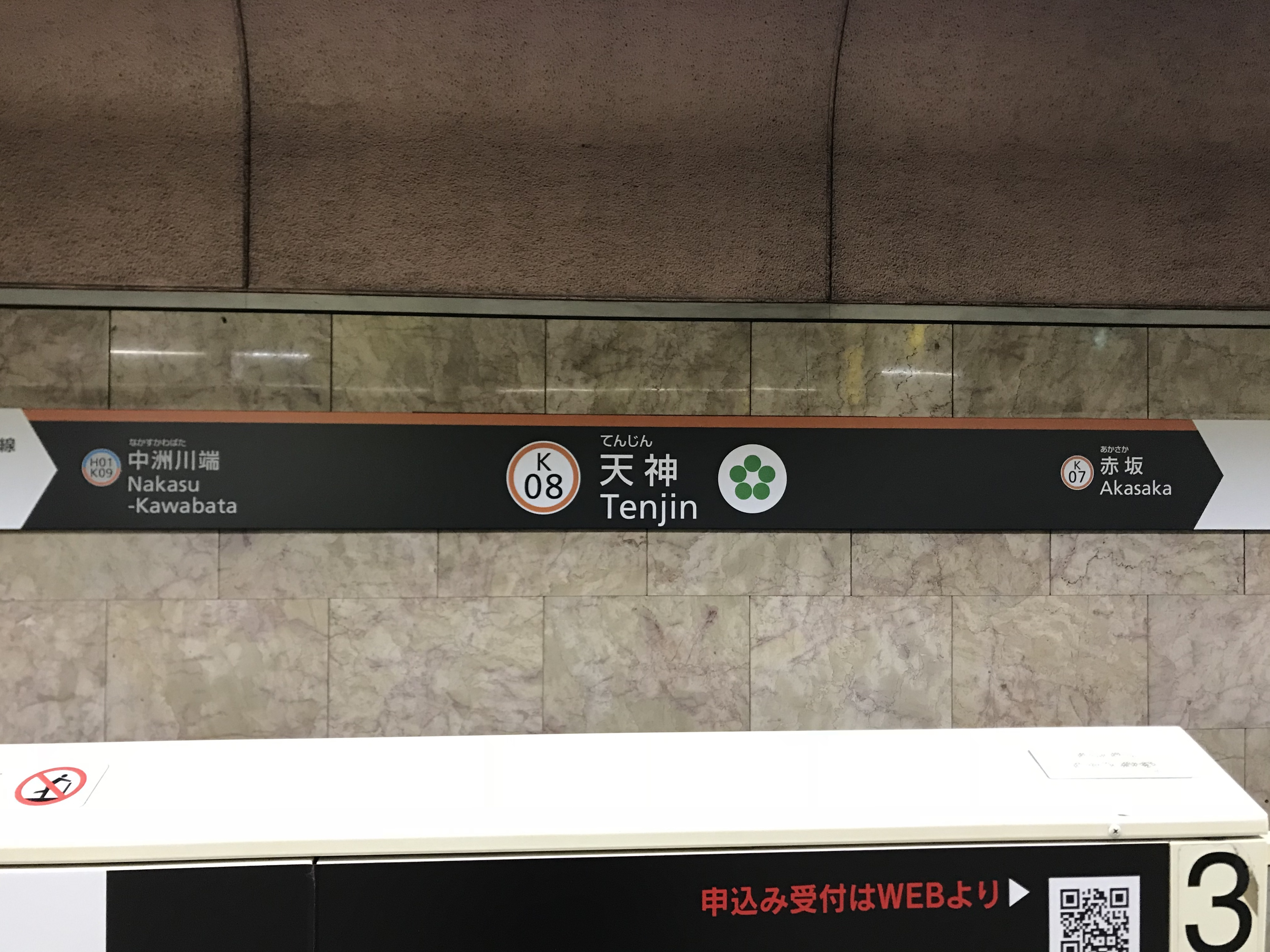 天神駅の駅名標。イラストはウメの花